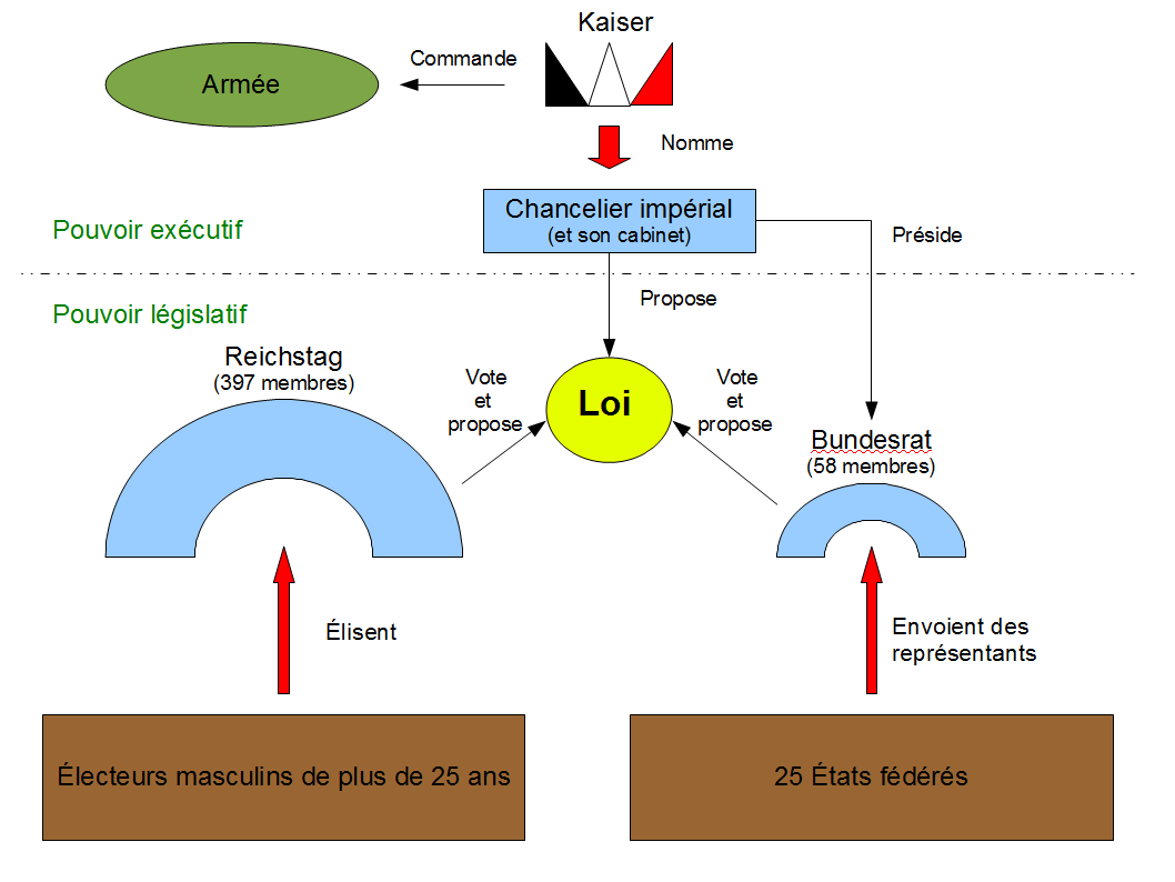 shéma de la constitution allemande de 1871